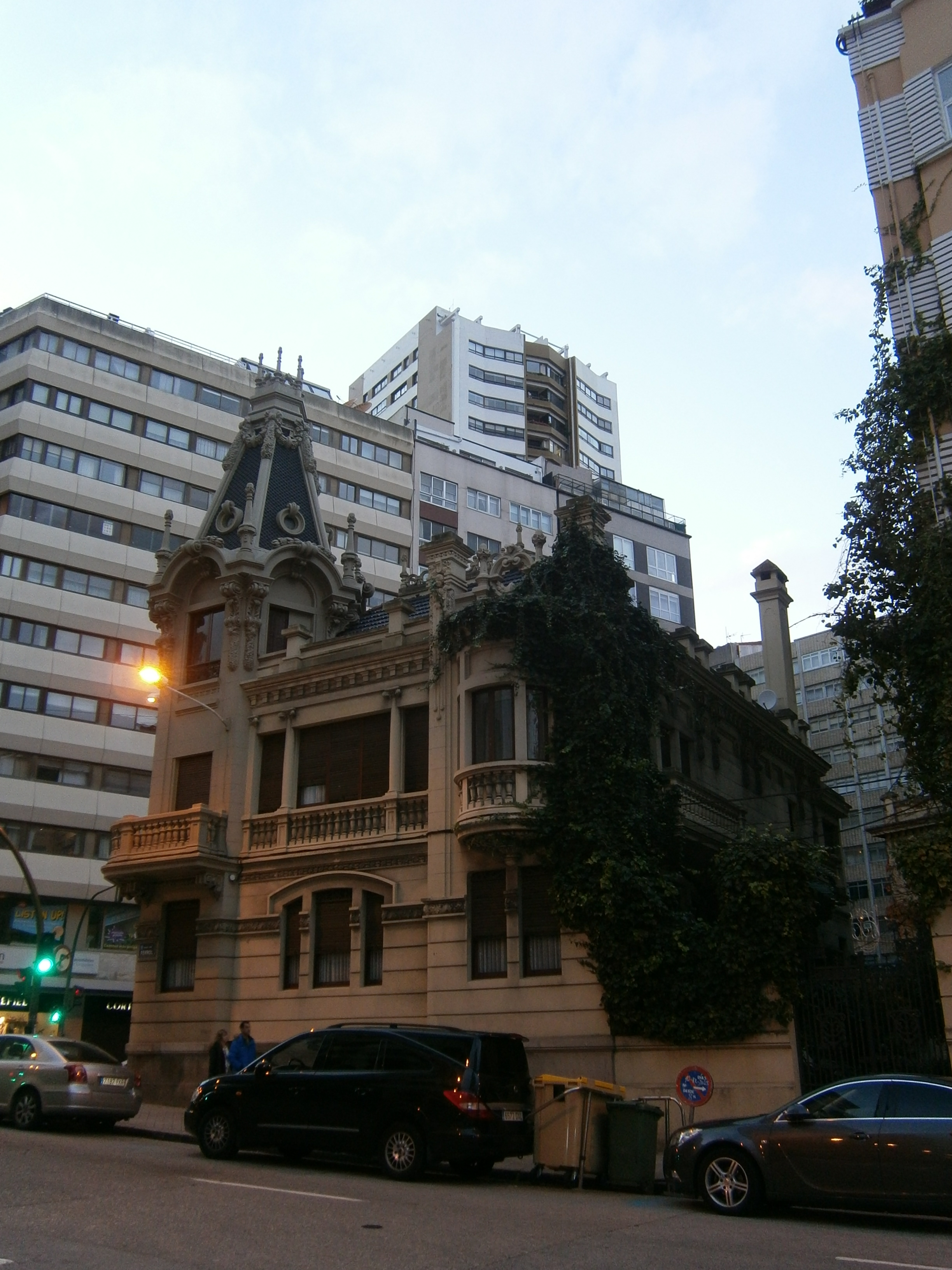 Casa Escudero, de Eduardo Rodríguez-Losada, na Coruña